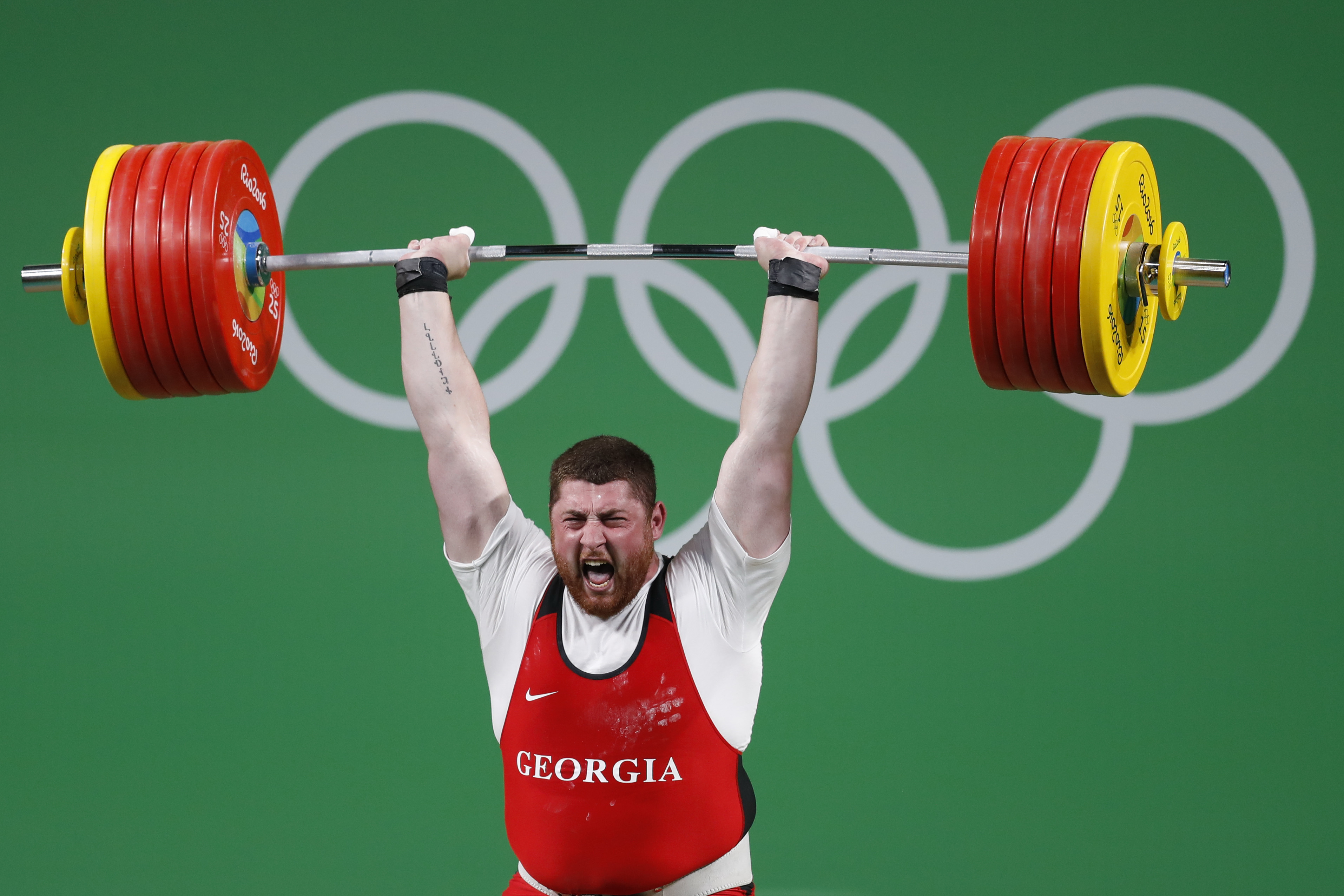 Rio de Janeiro - O georgiano Lasha Talakhadze bate o recorde mundial e leva ouro no levantamento de peso com 473kg ( Fernando Frazão/Agência Brasil)